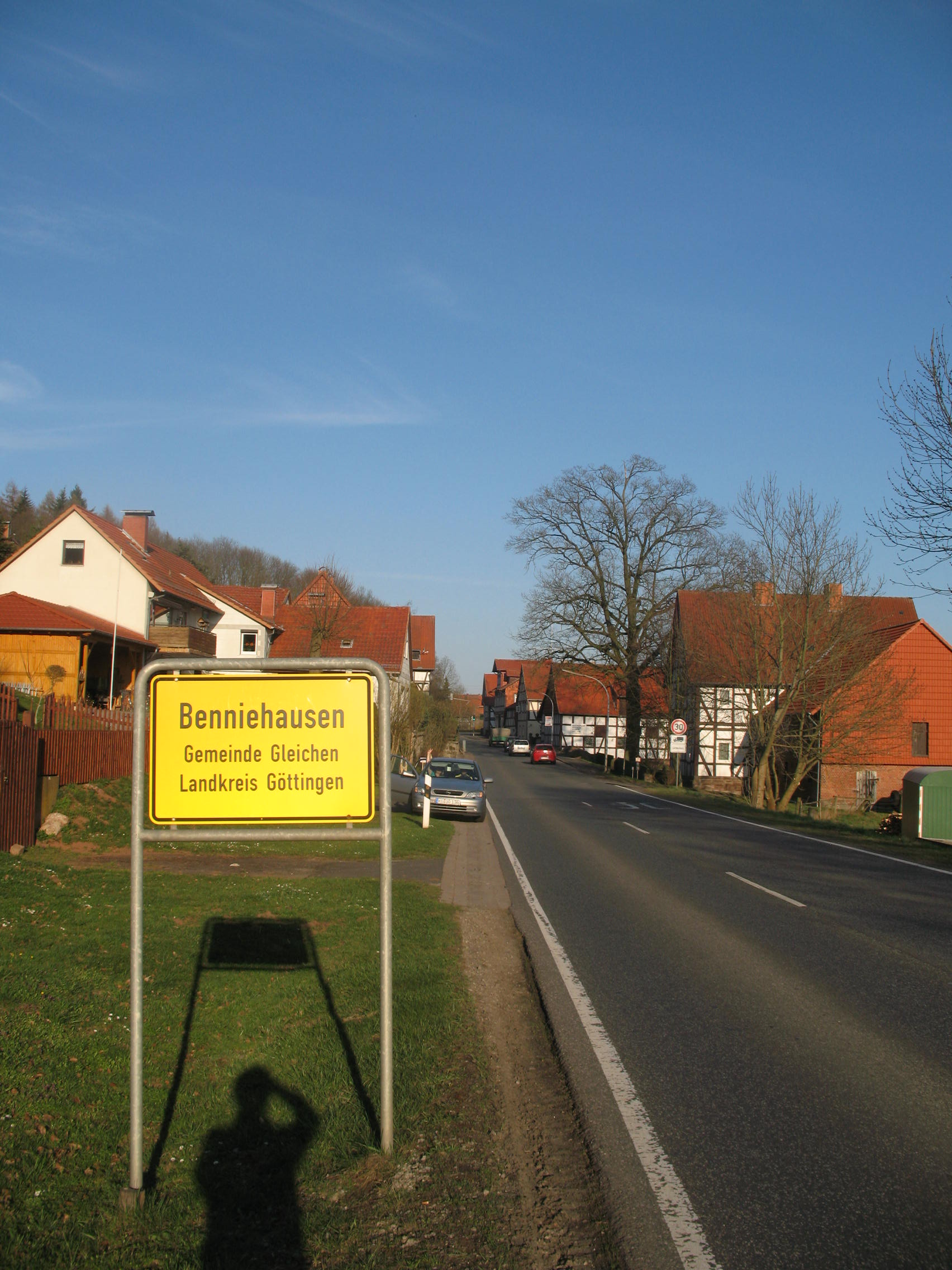 Ortseingang von Benniehausen im April. Ortseingangsschild im Vordergrund